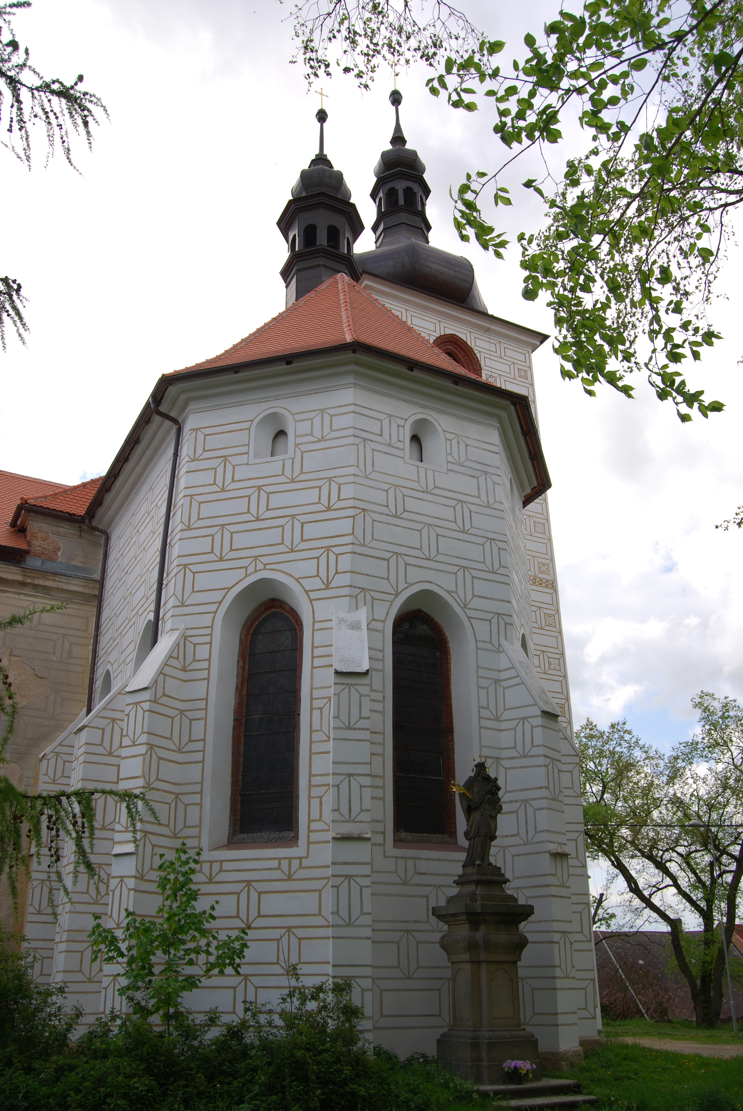 Kostel svatého Petra a Pavla. Kralovice. Okres Plzeň-sever. Česká republika.